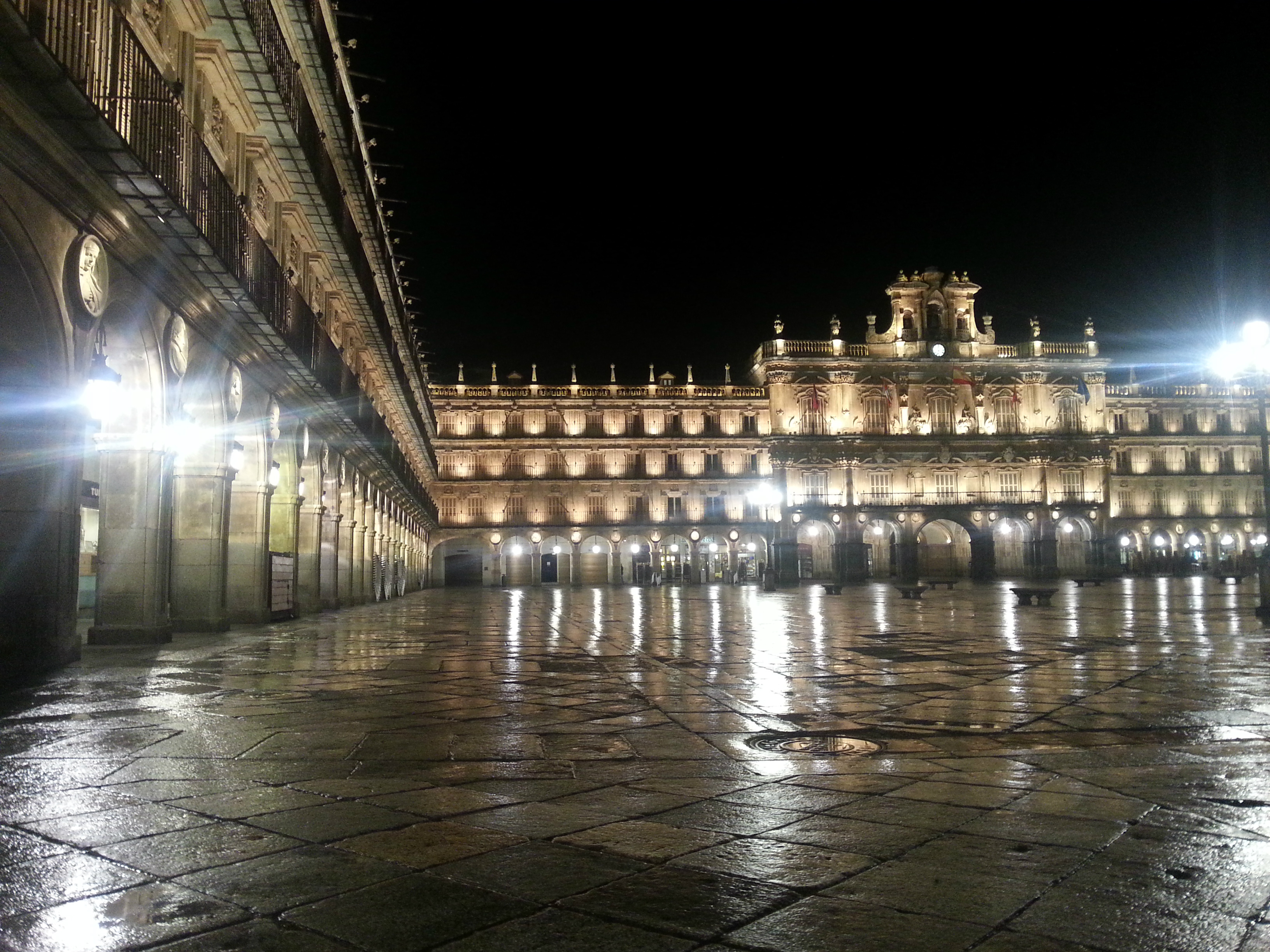 Plaza Mayor de Salamanca con el suelo húmedo tras una pequeña lluvia.